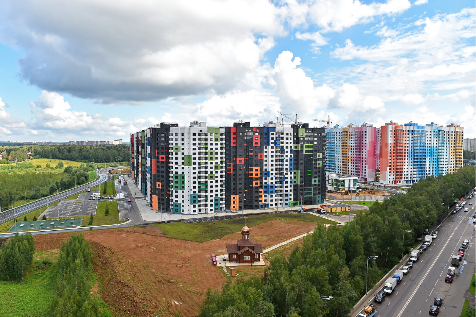 Новый жилой комплекс в поселке Северный